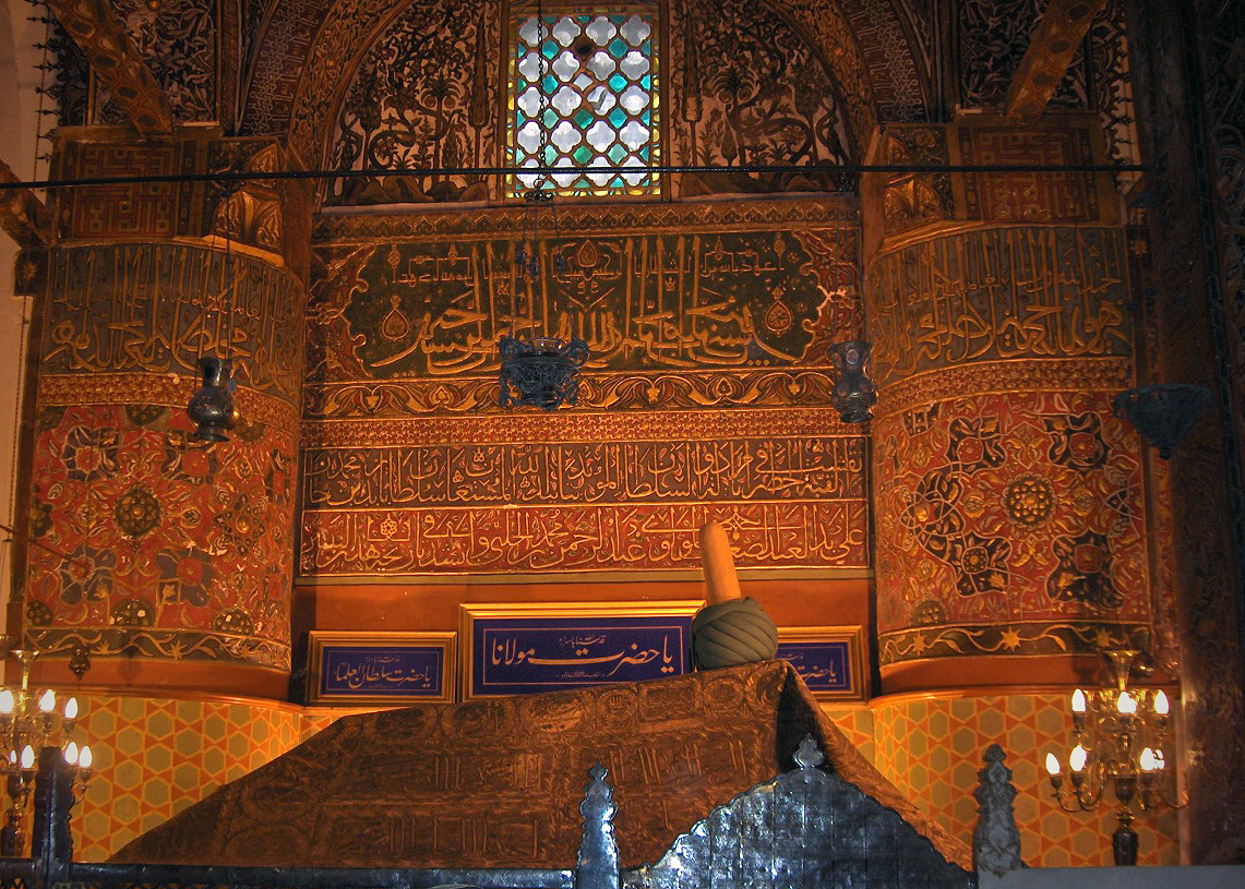 Tomb of Jalal ad-Din Muhammad Rumi; Mevlâna mausoleum; Konya, Turkey